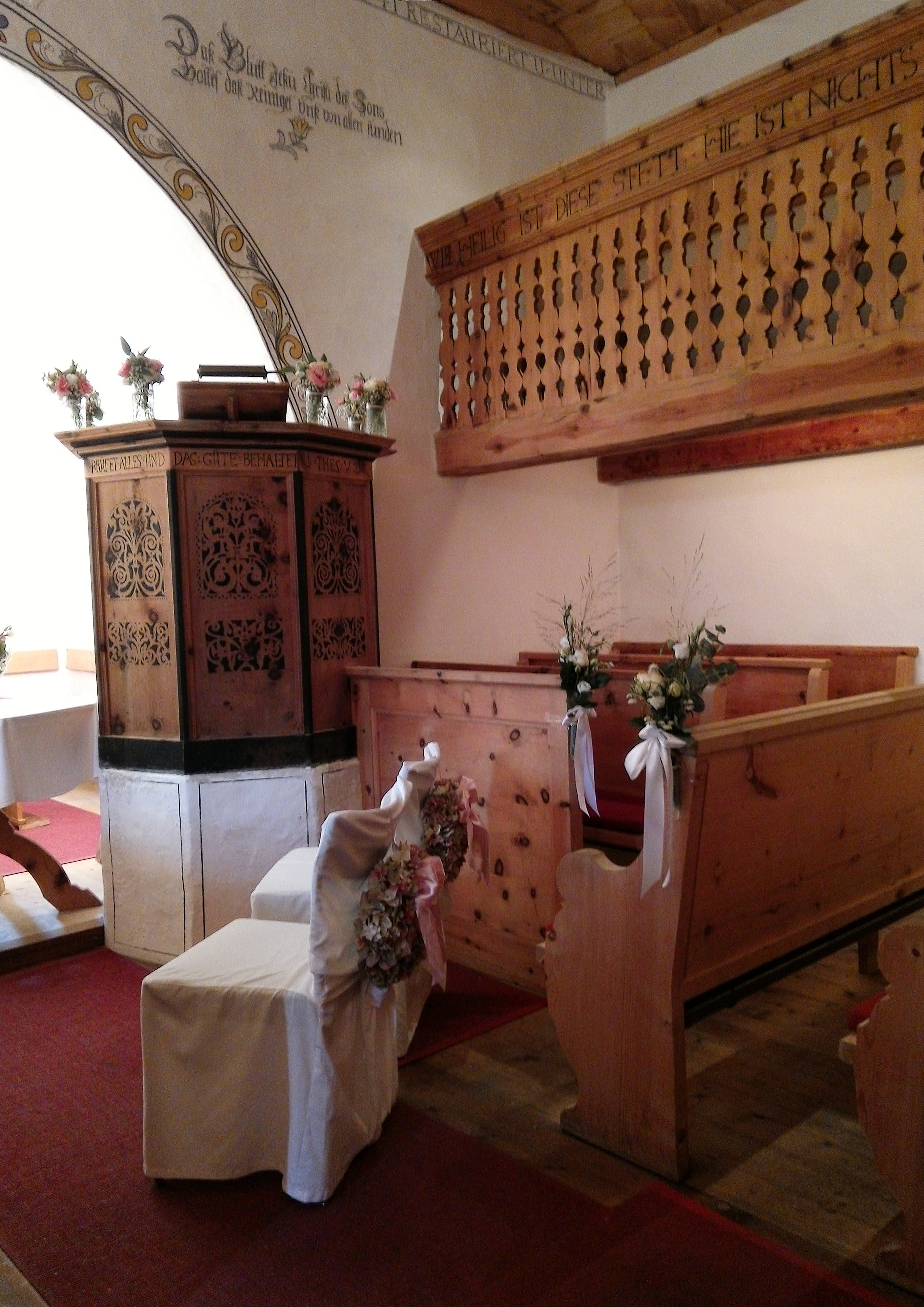 Innenansicht der Reformierten Kirche, Sertig, Graubünden, Schweiz. Blickrichtung Süd